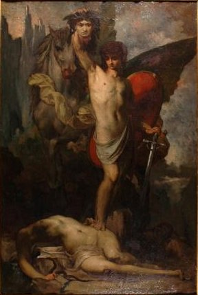 Persée vainqueur de Médusetitle QS:P1476,fr:"Persée vainqueur de Méduse" label QS:Lfr,"Persée vainqueur de Méduse"